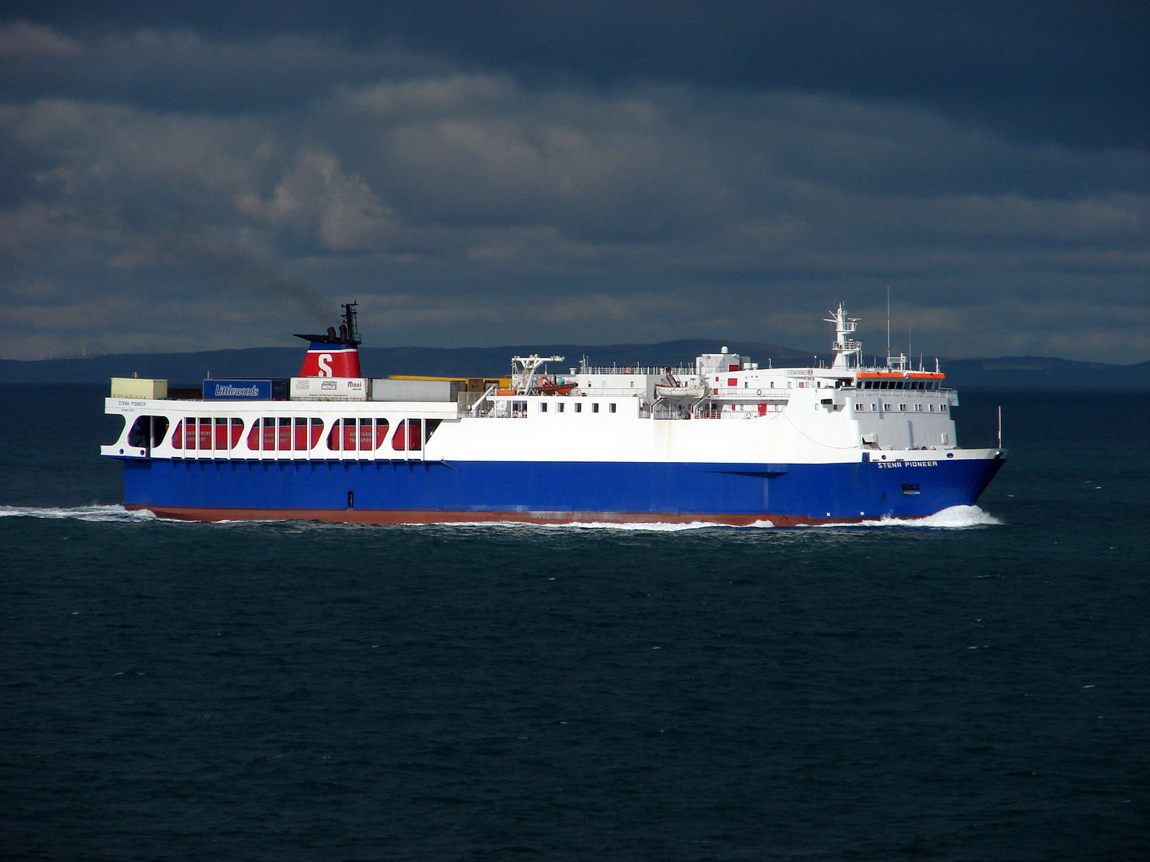 MS Stena Pioneer